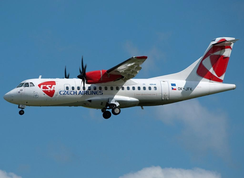 ATR 42-500 (OK-JFK) od Českých aerolinií pristáva na letisku Praha-Ruzyně